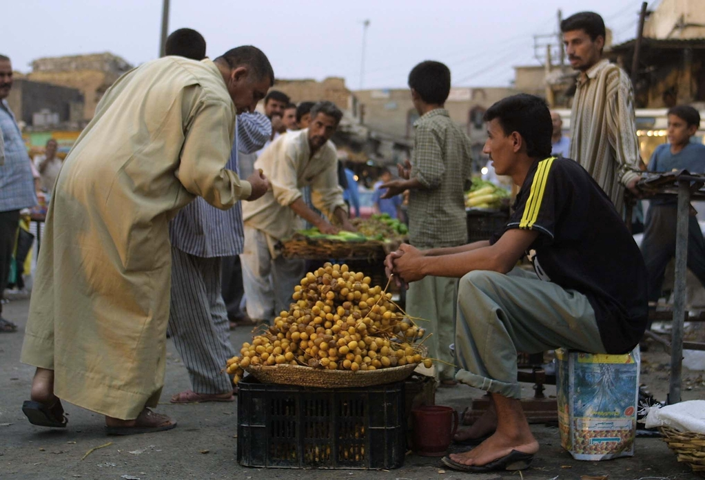 سوق الخضروات في منطقة خمسه ميل بمحافظة البصرة جنوب العراق